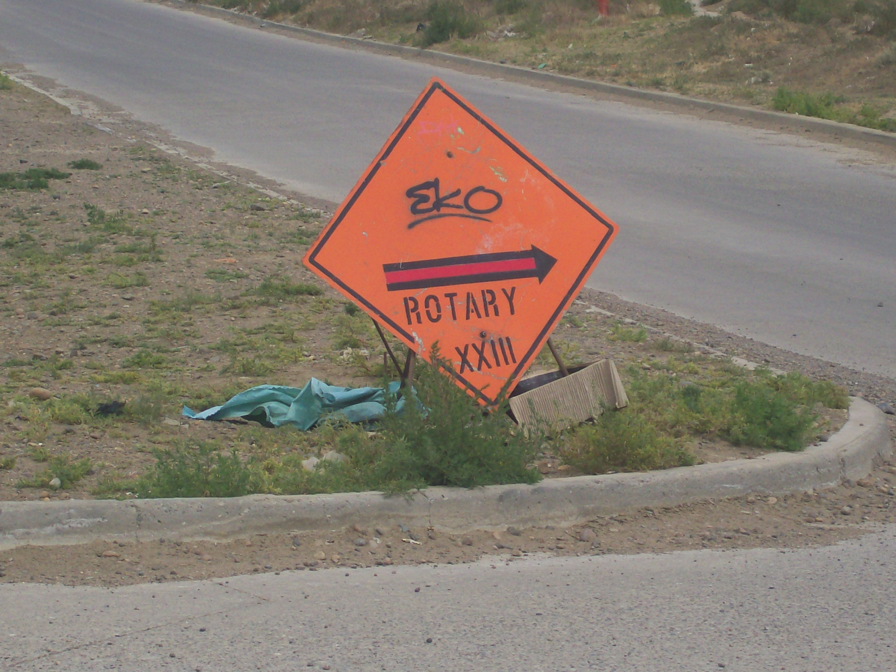 Cartel indicador al Rotary XXIII